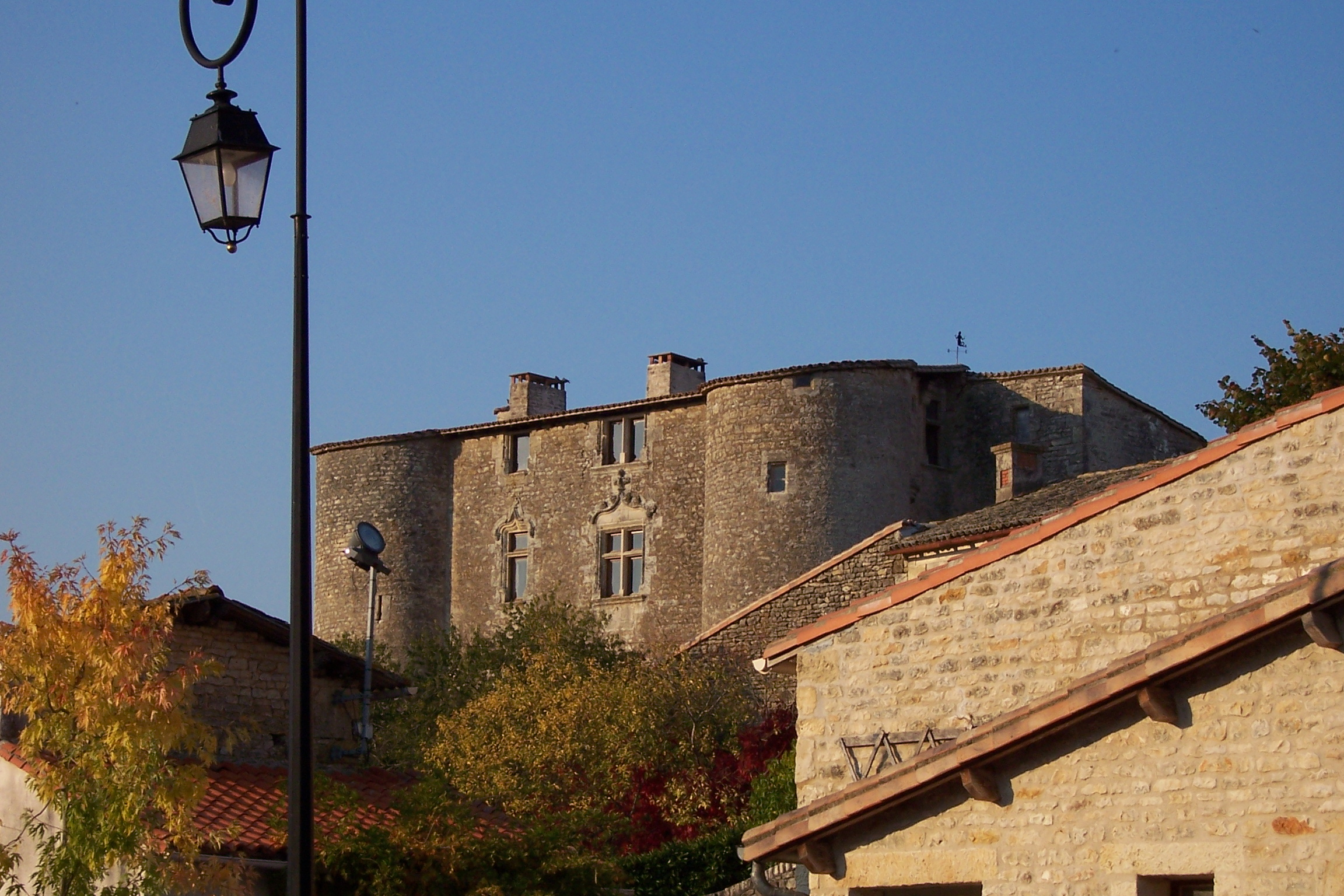 France - Deux-Sèvres - Exoudun - Chateau -Le château féodal dit "rasé" Il est bâti sur un roc, à flanc de colline et domine le bourg. C'est un vaste logis rectangulaire. Ses tours furent rasées sous l'ordre de Richelieu. Il est ainsi privé de ses mâchicoulis.